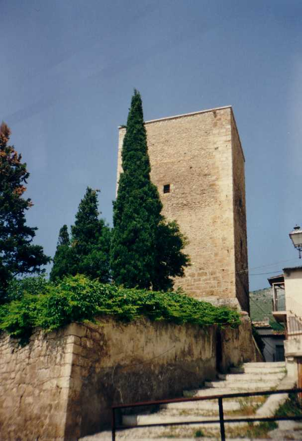 La torre di Castel di Ieri - collocata su un cocuzzolo alto 65o metri - senza vere fondamenta - ma con una base piramidale tronca dalle mura larghe più di due metri per un'altezza di circa cinque metri, svetta per altri 15 metri a dominare la valle Subequana a 360°. La struttura aveva certamente una merlatura che, per effetto dei ripetuti terremoti, è andata distrutta, ma è ben visibile in un quadro del paese risalente ai primi anni del 1900. La storia dei Pegligni e "Superaequum" facenti parte della IV regione di ROMA DAL 303 A.C. non fornisce elementi di certezza storica ma, il fatto che la base piramidale, senza accesso, così poggiata direttamente sulla base rocciosa con un'unica finestrella di avvistamento sul lato rivolto a sud/est con due speroni di appoggio, possono far ritenere che la stessa sia stata costruita ad un'epoca anteriore al 390 a.c. Dalla sommità della torre, oltre che da una finestrella di avvistamento rivolta a ovest a circa tredici metri di altezza, si può controllare ed avvistare movimenti di persone sul prospicente Colle di Narola/Le Castagne per il passo di Forca Caruso ed il Monte Ventrino - dove nel 1987 è stato rinvenuta la necropoli/ex oppidum di "Marcus Caedicius". Dalla stessa Torre, molto probabilmente - durante la guerra civile- nell'anno 620 di Roma- 90 a.c. furono controllate le battagli dei Romani contro gli Italici di "CORFINIUM" consentendo agli stessi di ripiegare - attraverso il passo "Le cese Piane" nella valle Peligna -la ben fortificata CORFINIUM- Per diversi secoli la torre perse importanza, per arrivare intorno all'anno mille e, nel medioevo in cui ebbe ancora una funzione di avvistamento e protezione per la popolazione dell'OPPIDUM, contro le ripetute invasioni - Le ripetute invasioni però l'anno ben conservata fino a oggi.